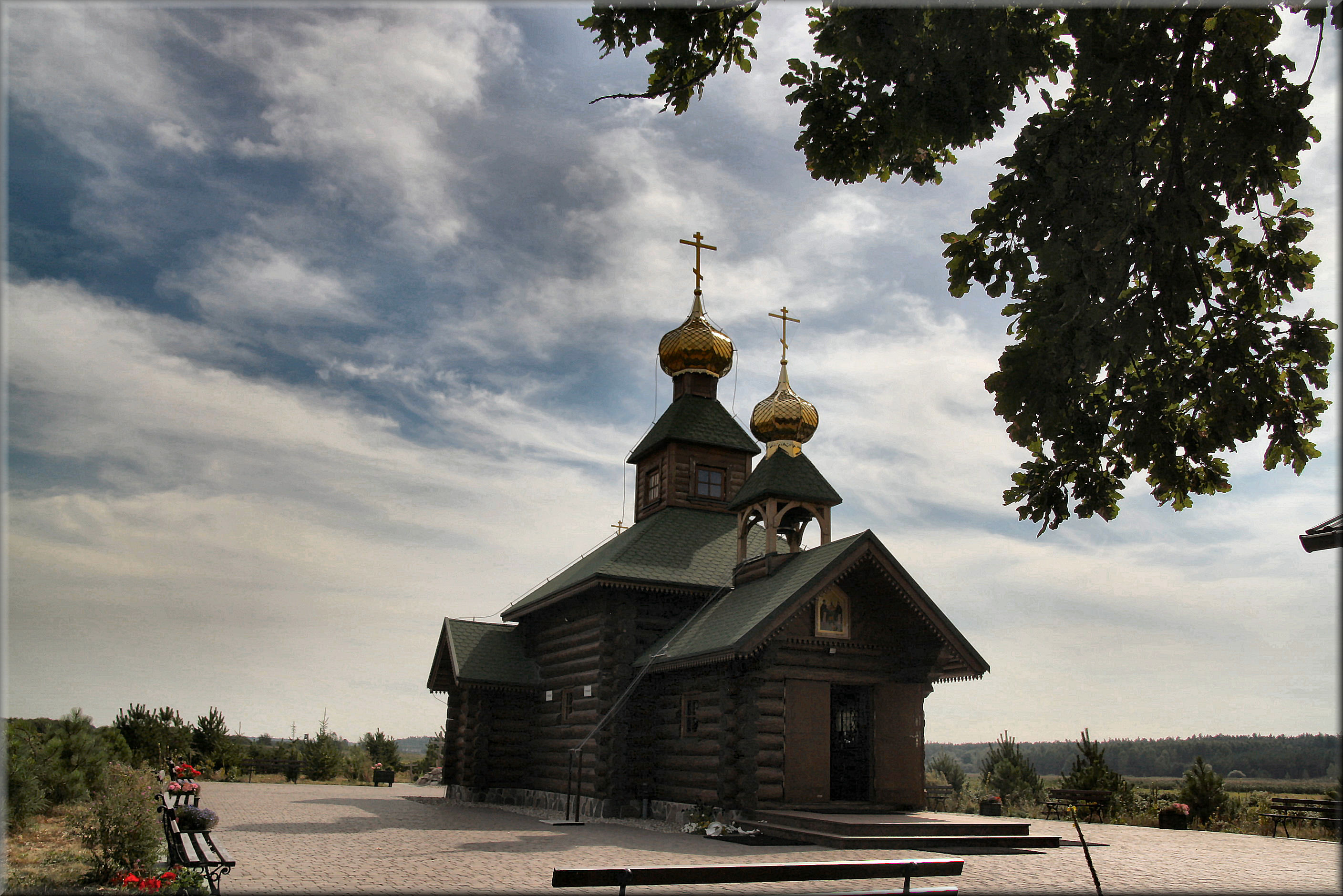 Cerkiew Opieki Matki Bożej na terenie skitu Świętych Antoniego i Teodozjusza Pieczerskich w Odrynkach.